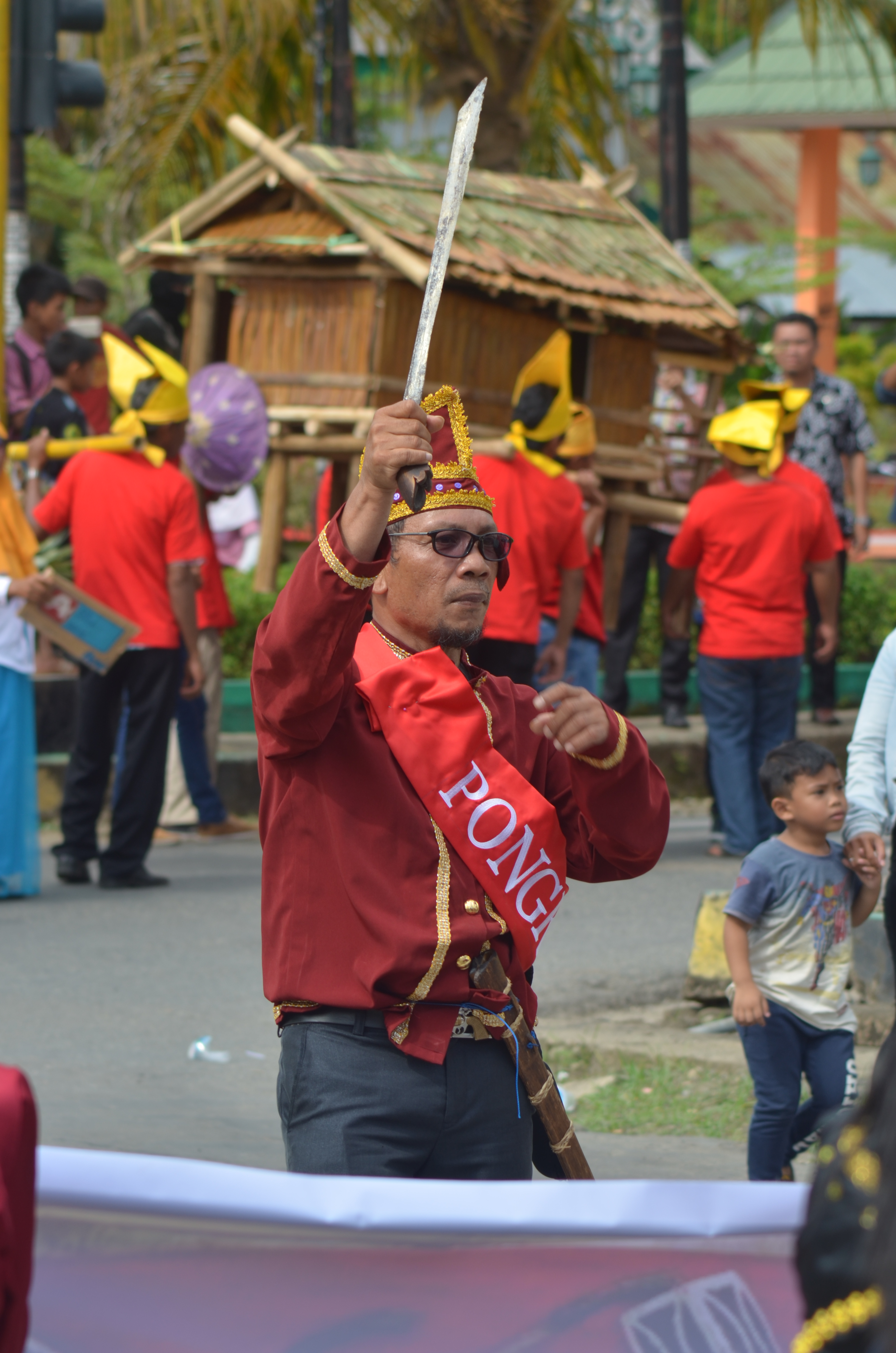 Tarian momani